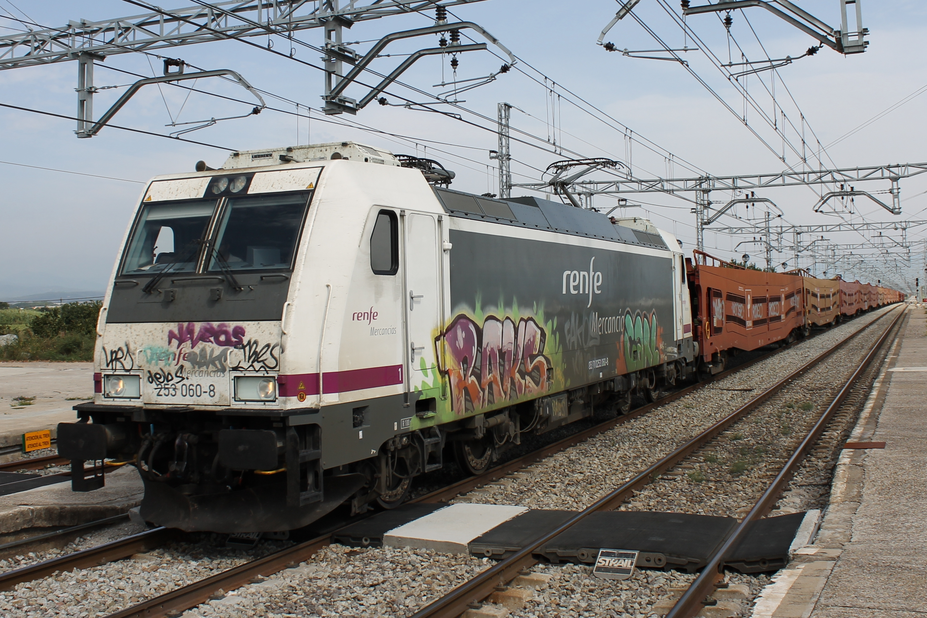 La locomotora eléctrica 253.060 (TRAXX F140 DC) de Renfe Operadora, con un mercancías portacoches vacio, pasando por la estación de Vilamalla.